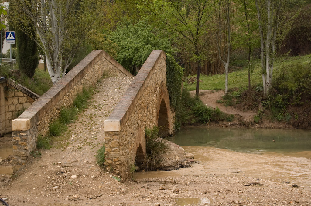 Puente de piedra de Riofrío, en el municipio de Loja (Granada, España)